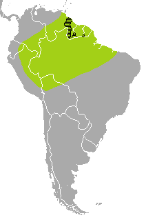 Pionites melanocephalus